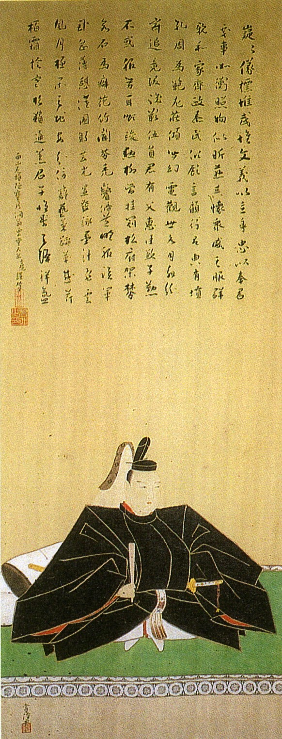 丹羽光重の自画像(市指定文化財)。